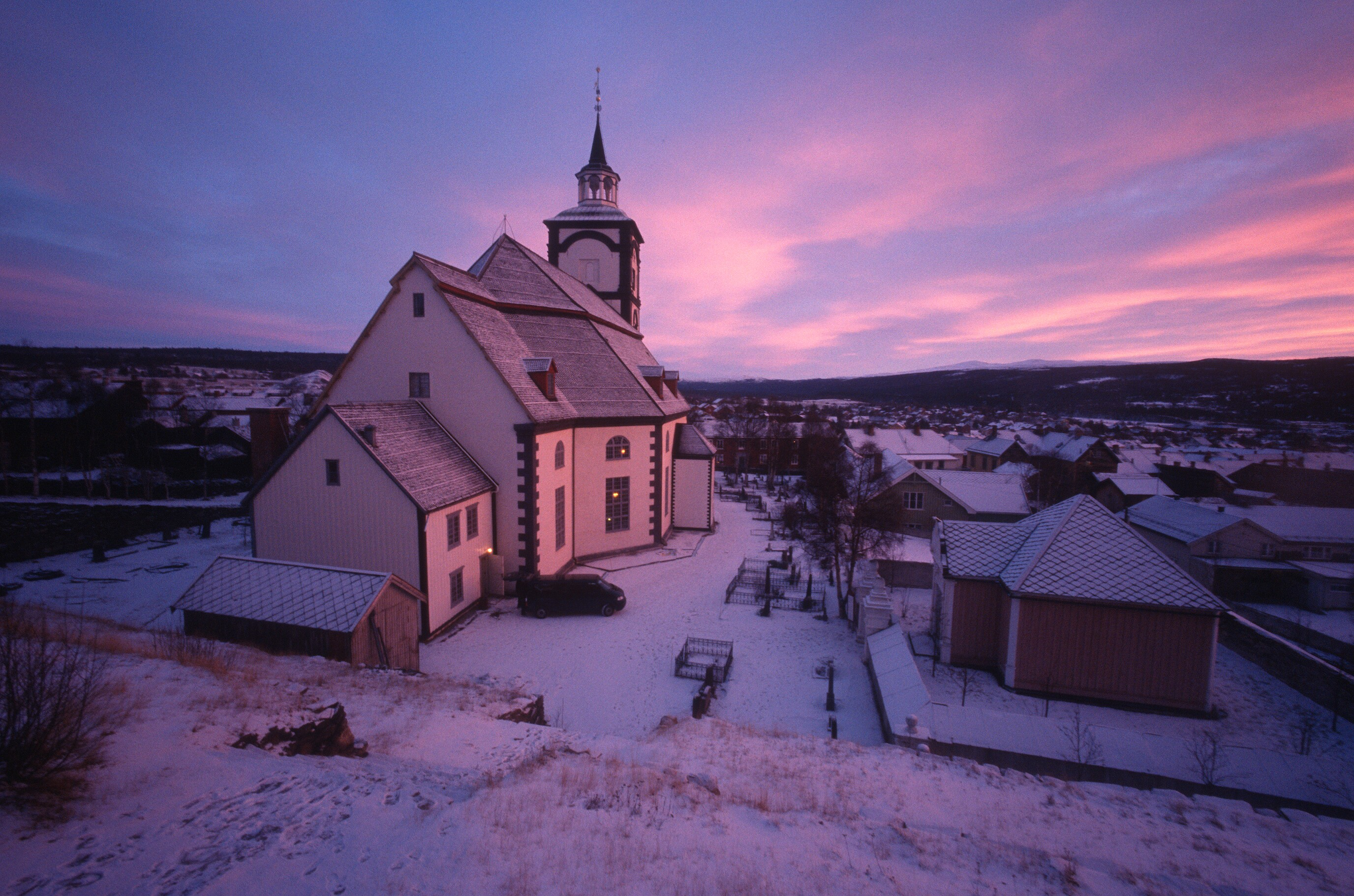 Røros